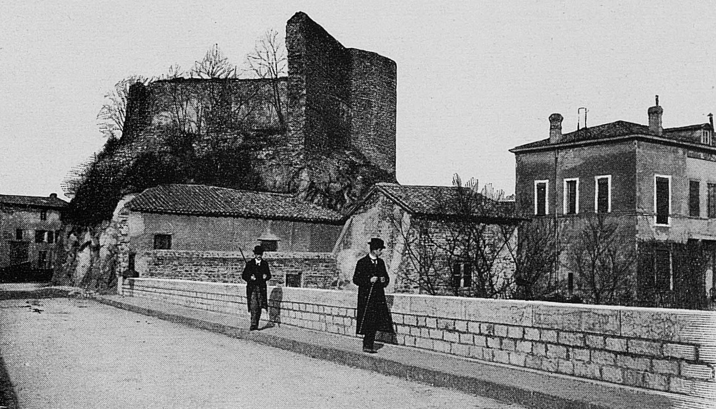 Dictionnaire illustré des communes du département du Rhône. Tome 1 / par MM. E. de Rolland et D. Clouzet.